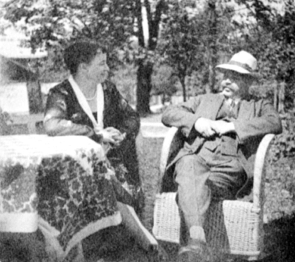 Maria & Zygmunt Szczotkowscy